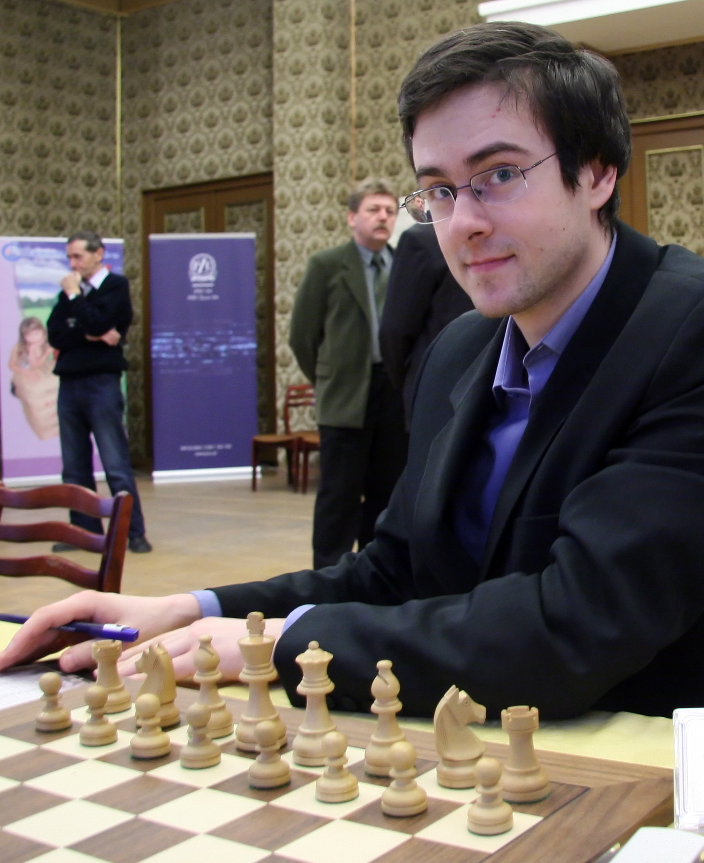 GM Bartłomiej Macieja, Opole 2007